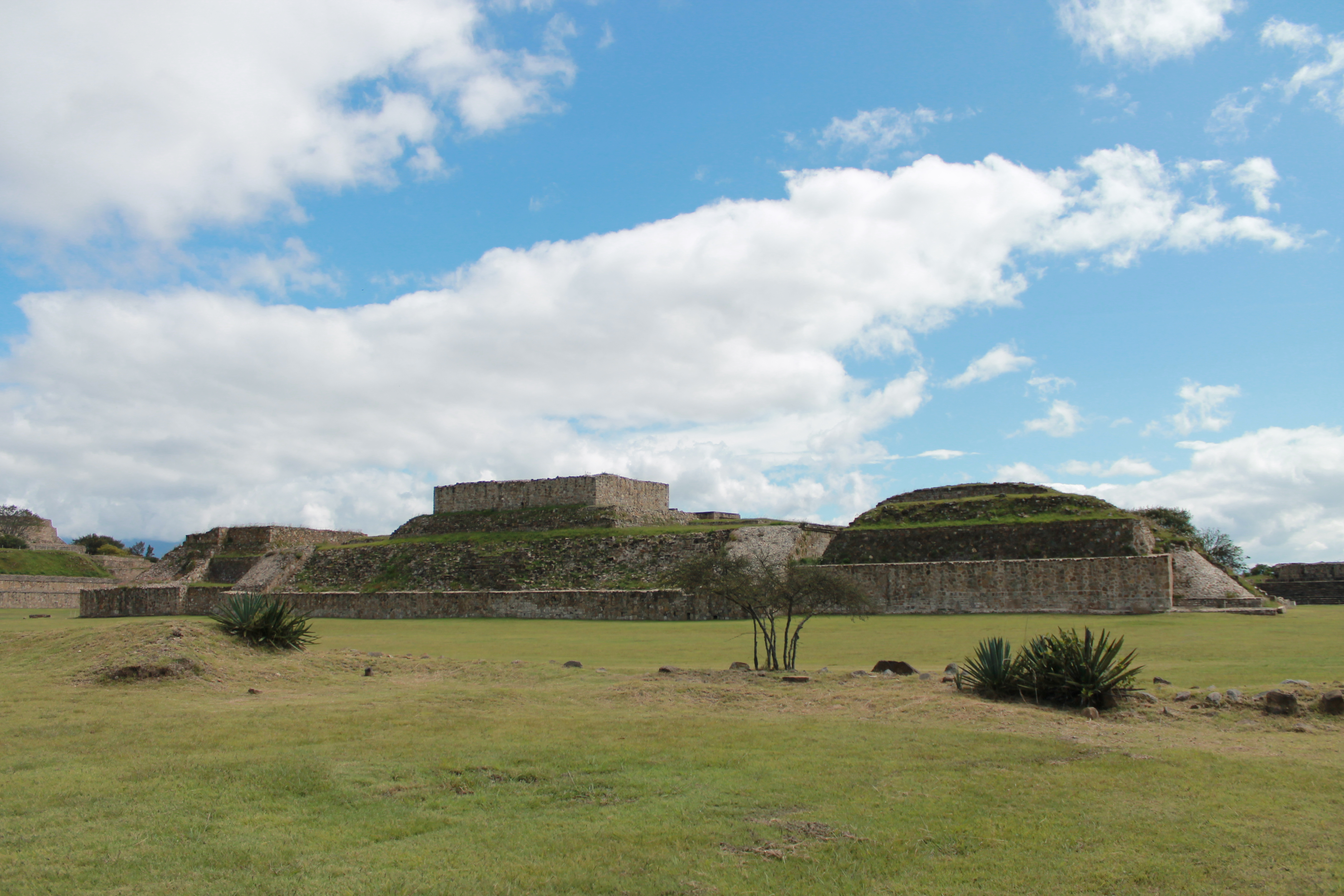 Vista posterior del Edificio I, Edificio H y Edificio G (de izquierda a derecha). Perspectiva desde parte frontal del Edificio de los Danzantes.